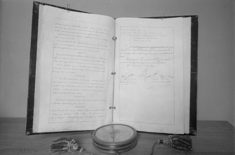 Geschichte gebündelt! Ein Gang durch das Preussische Geheime Staats-Archiv in Berlin-Dahlem. Der Friedensvertrag von Tilsit nach dem grossen russischen Feldzug Napoleons zwischen Frankreich und Preussen von 1807.